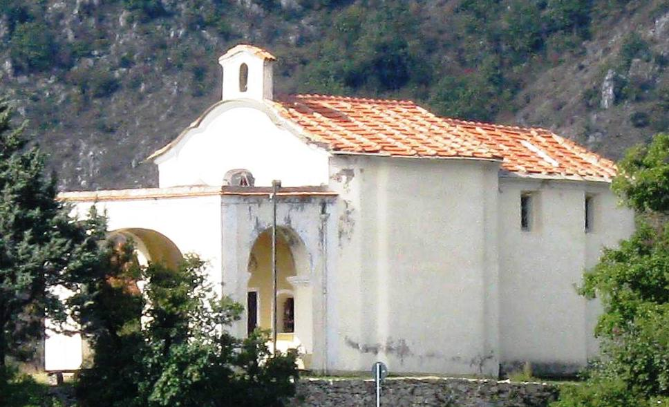 Castelvecchio di Rocca Barbena, Bedevaartskerk op de heuvel.